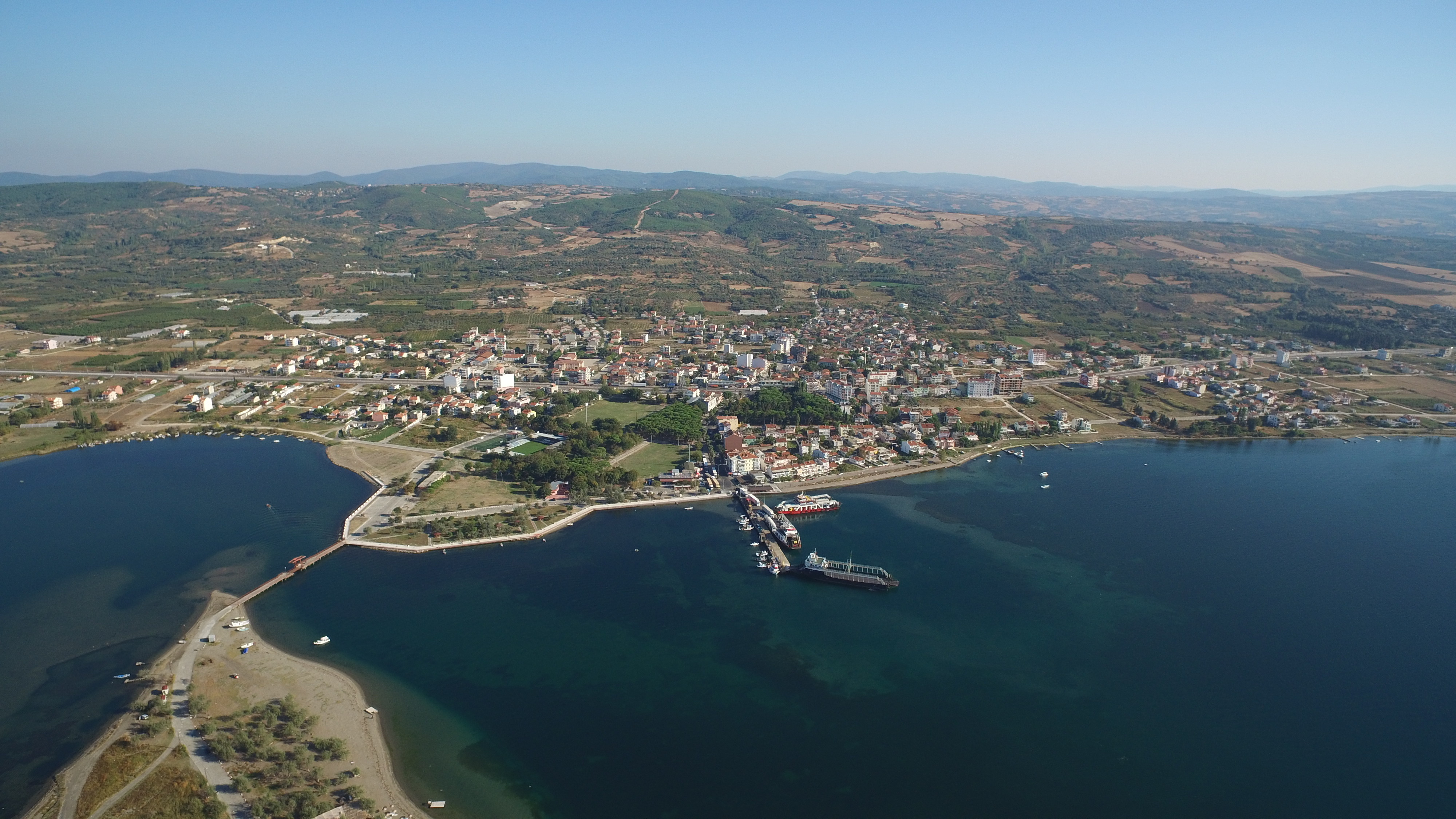 Çardak Beldesi havadan görünüm